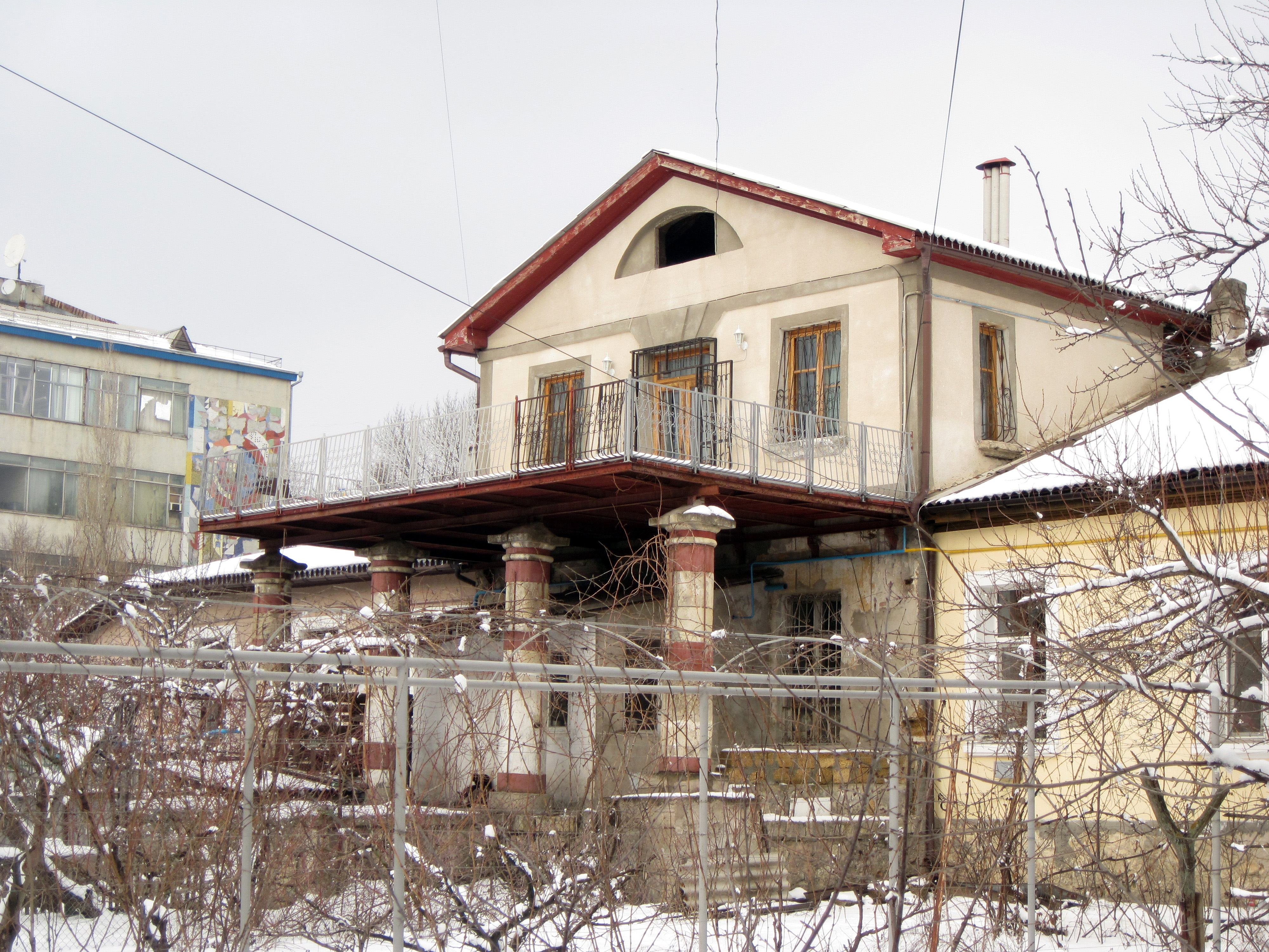 Дом 1853 г. жил доктор медицины и общественный деятель Ф.К.Мильгаузен (Мюльгаузен). Здание, в котором с 1952 г. по 1962 г. работал доктор медицинских наук Е.И.Захаров, 1927 г.: улица Киевская, 24улица Киевская, 69, литер "А", Симферополь, Крым This object is located on the Crimean Peninsula and recognized as cultural heritage by Russia under the monument ID: 8231117000. The legal status of the Crimean region is currently disputed.